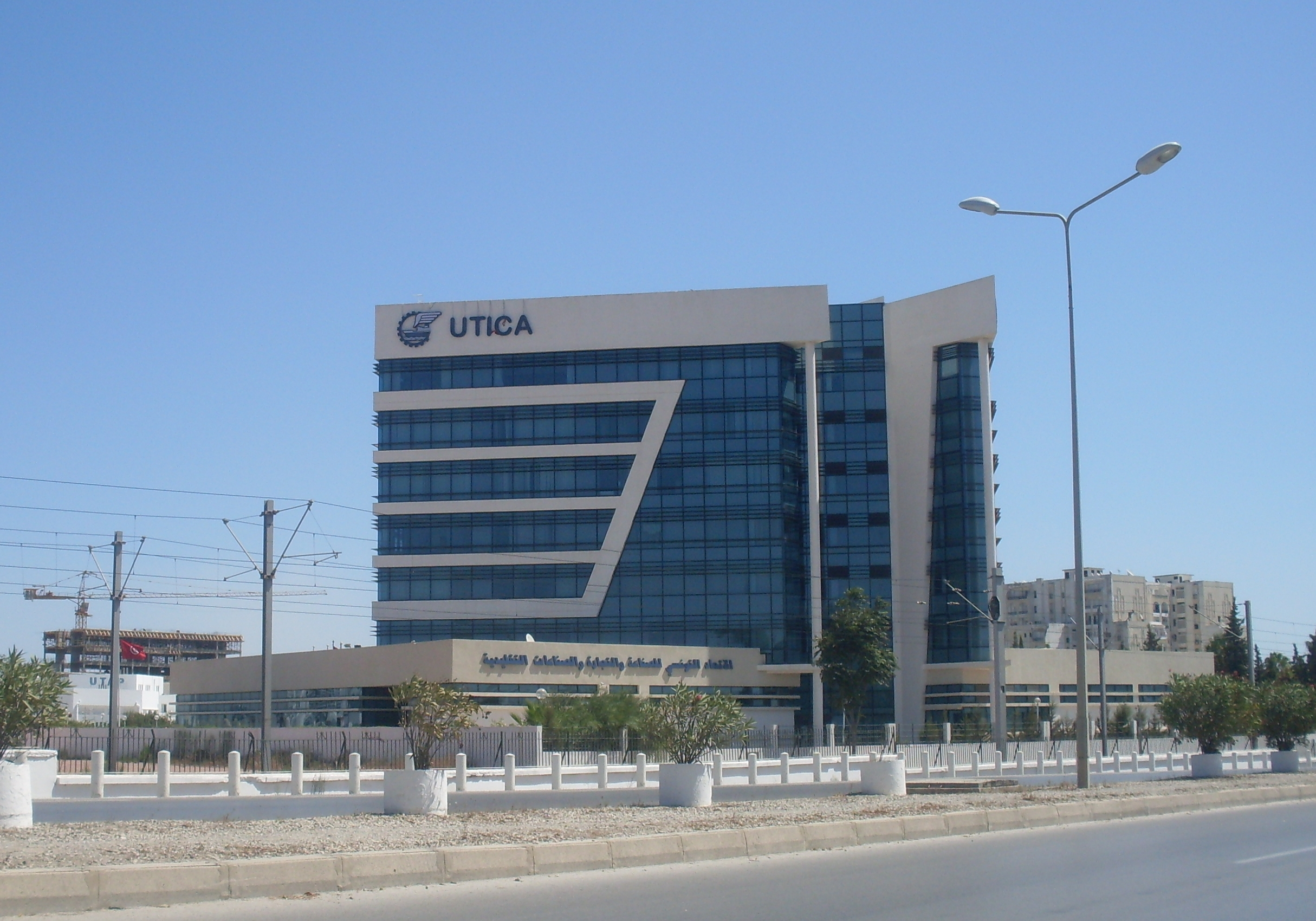 Tunis, Siège de l'Union Tunisienne d'Industrie et de Commerce